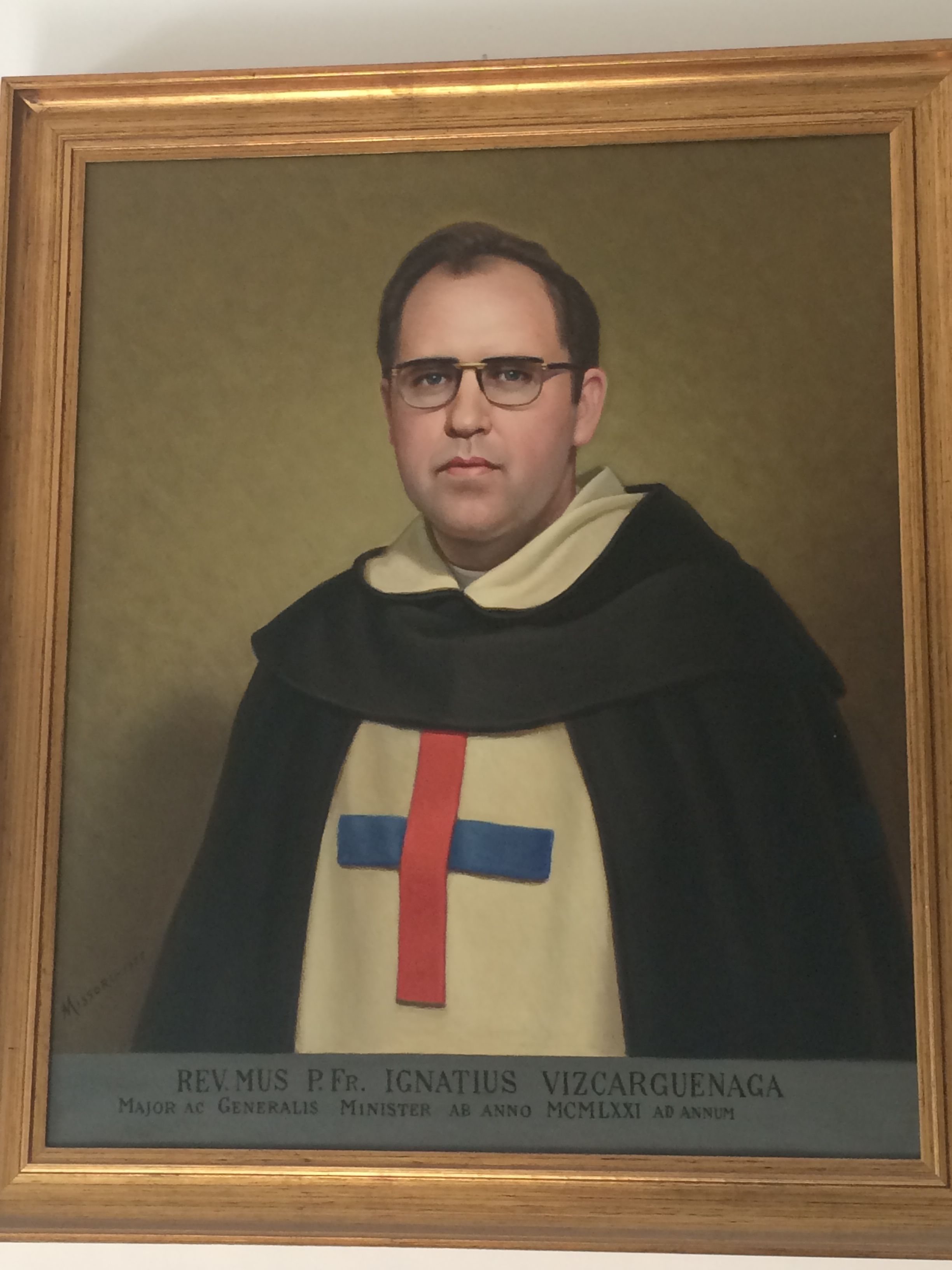 81º Ministro General OSST